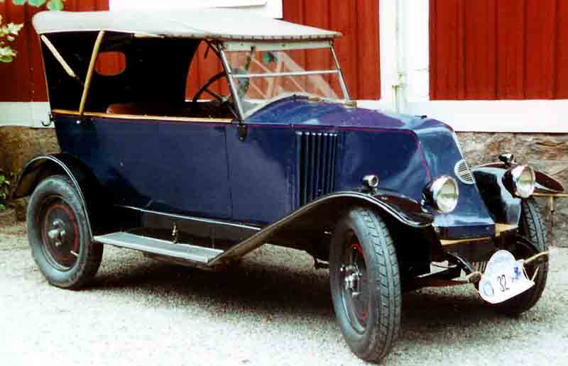 Renault KJ-1 Tourer 1923